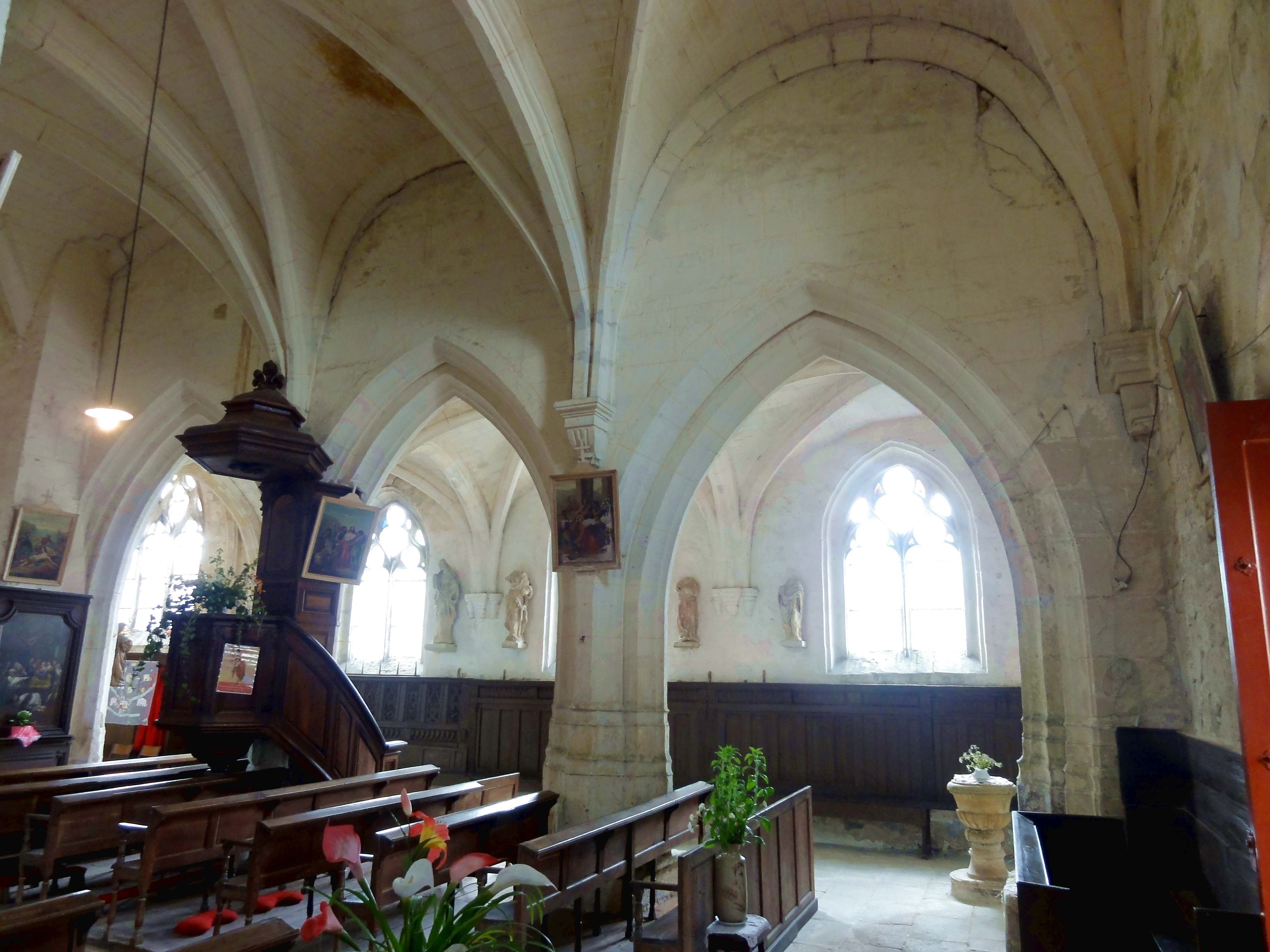 Intérieur de l'église - voir titre.